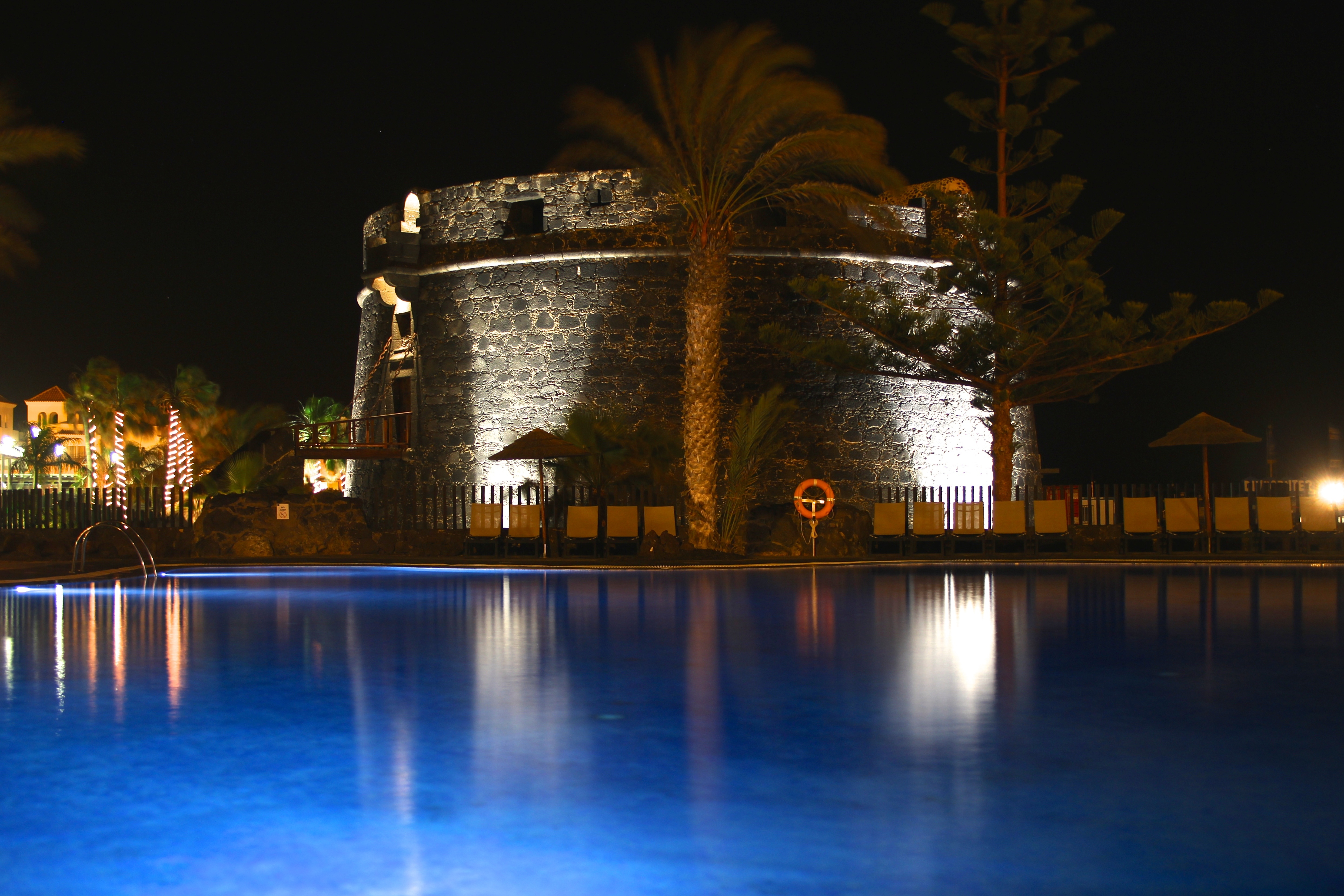 Caleta de Fuste, Antigua, Fuerteventura.